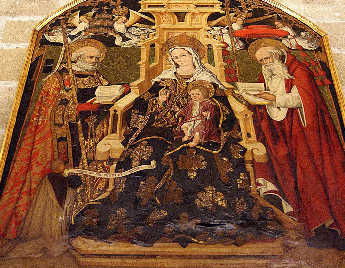 procedente de la iglesia de San Julián de Sevilla, donde fue descubierta en 1876 oculta tras un retablo, aunque fue trasladada posteriormente a su emplazamiento actual.